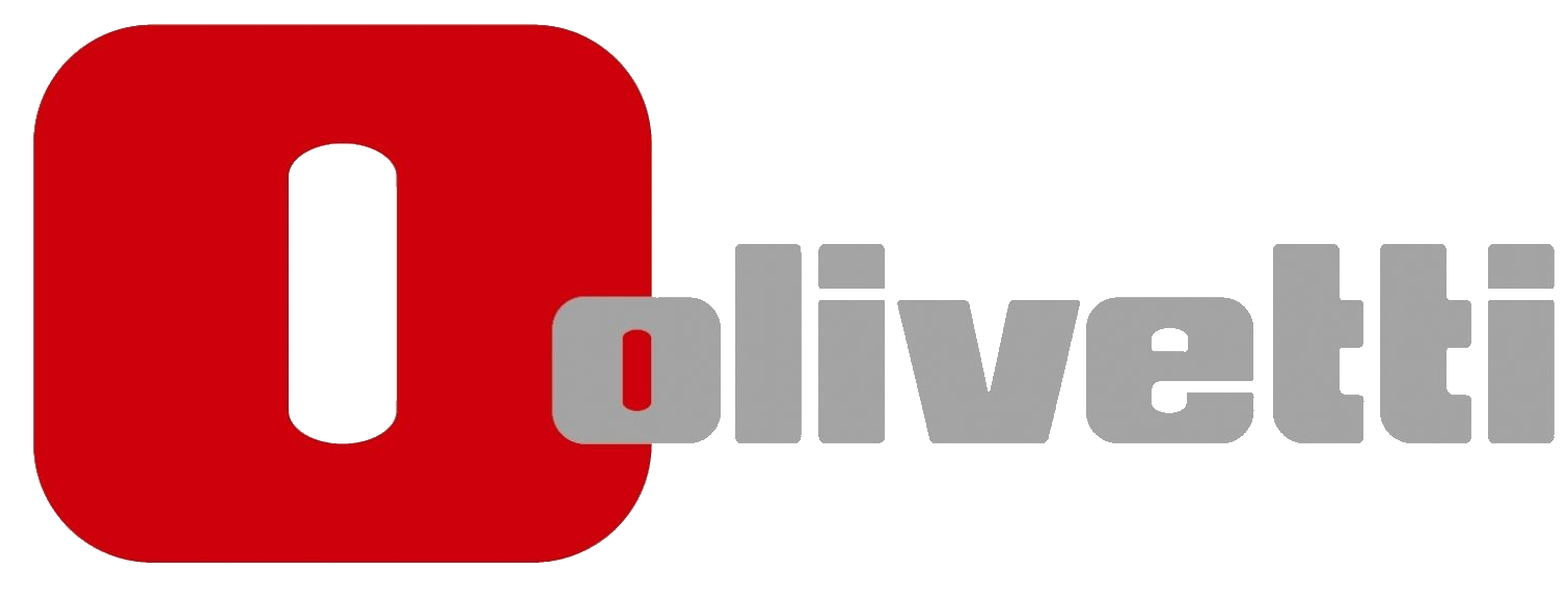 Logo Olivetti adottato dal 2006